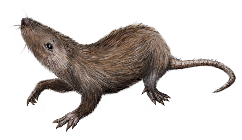 Sunnyodon notleyi.